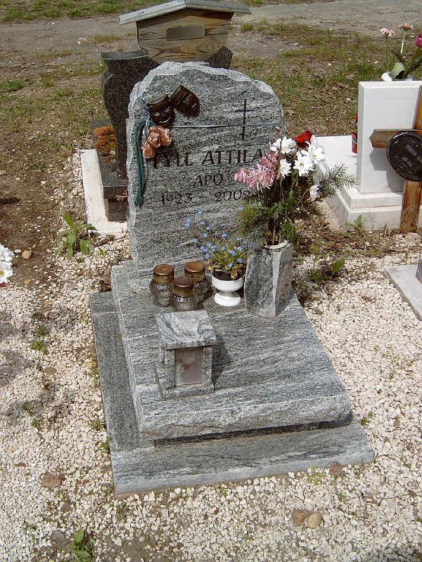 Tyll Attila sírja Budapesten. Új köztemető: 113/1.